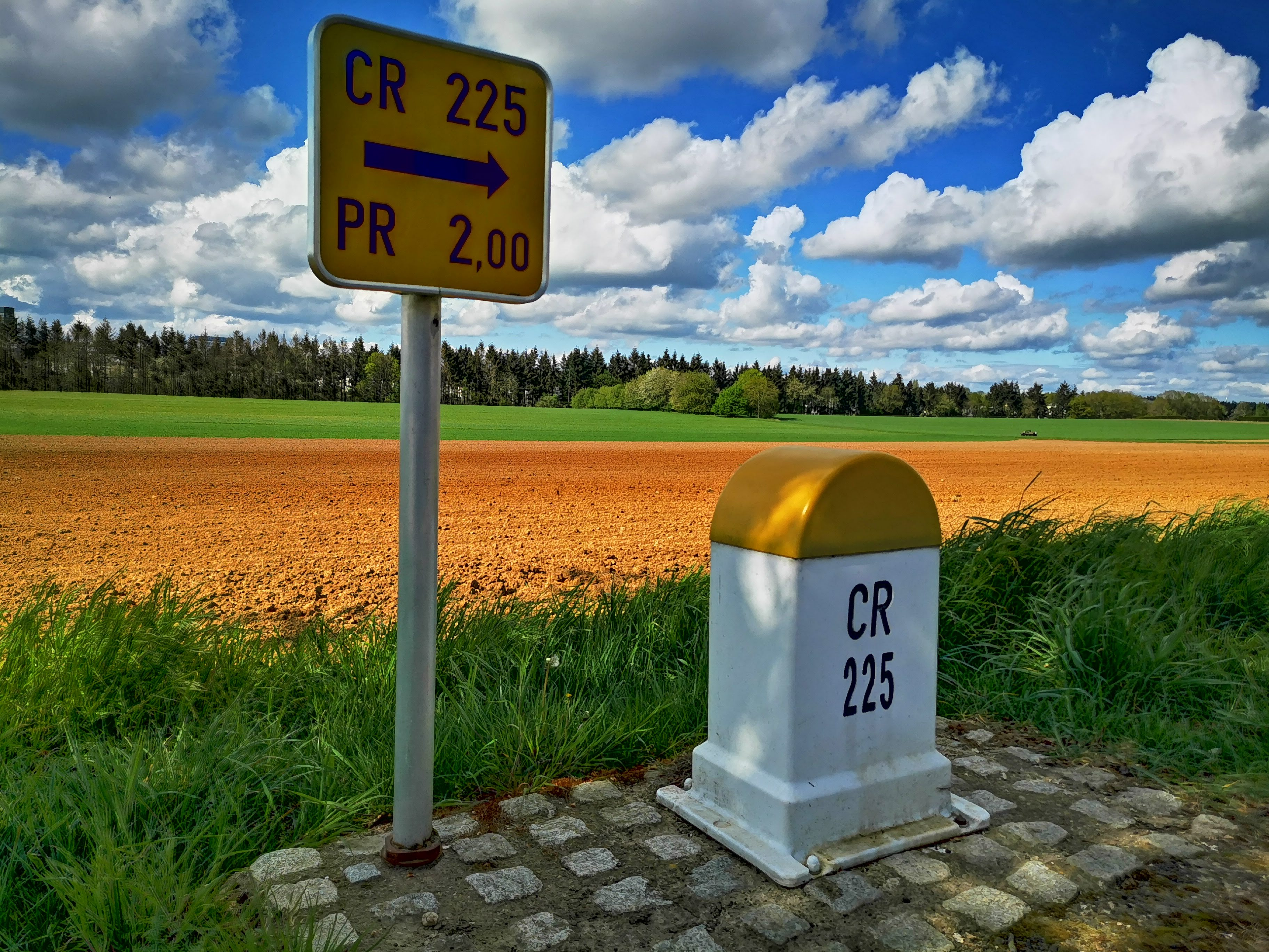 Signal routier E,21dc "Identification - chemin repris" du Code de la Route luxembourgeois avec une borne kilométrique